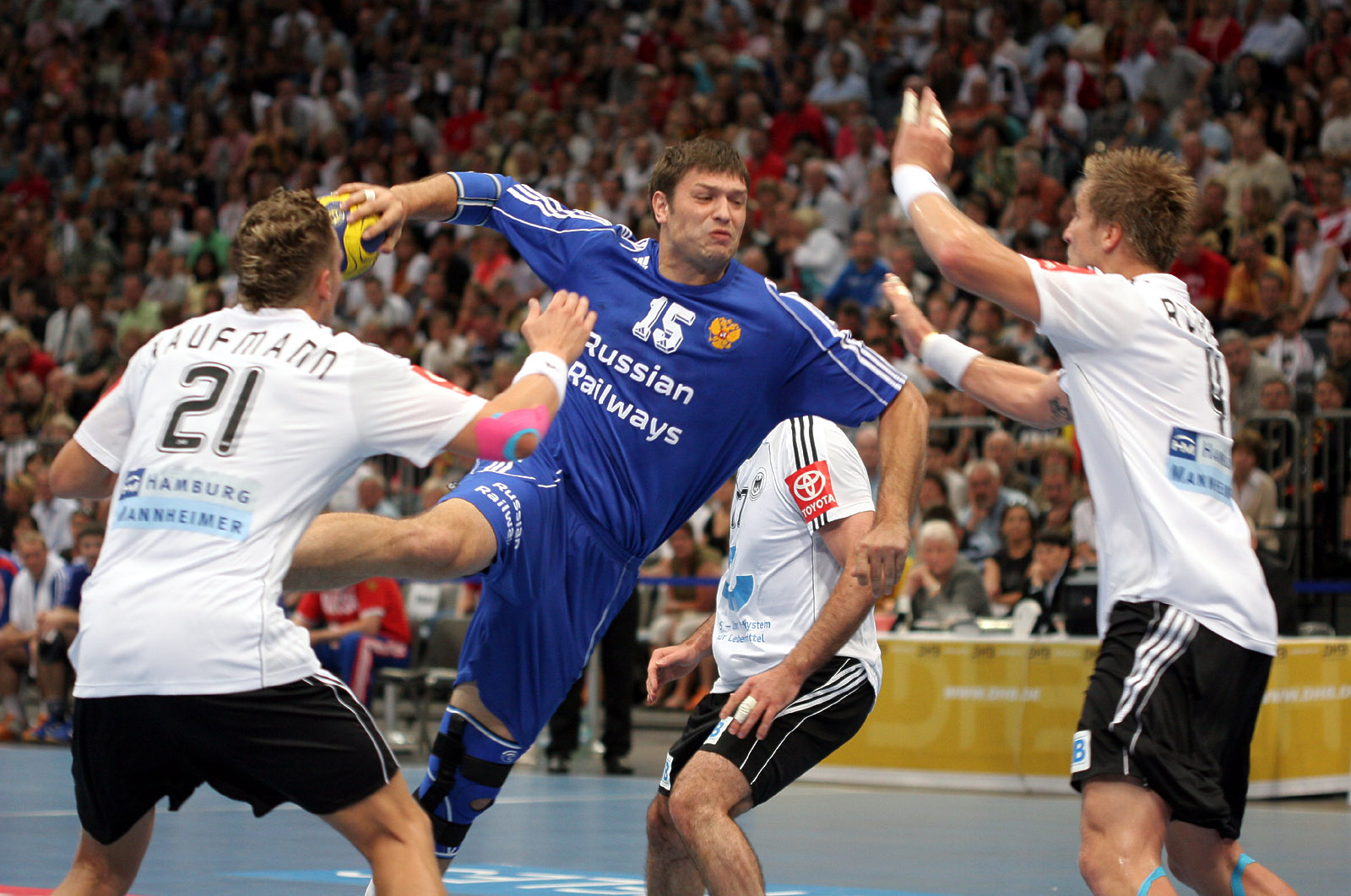 Alexei Rastworzew, russischer Handballnationalspieler, während des Länderspiels Deutschland - RUssland am 26. Juli 2008 in der Kölner Lanxess-Arena